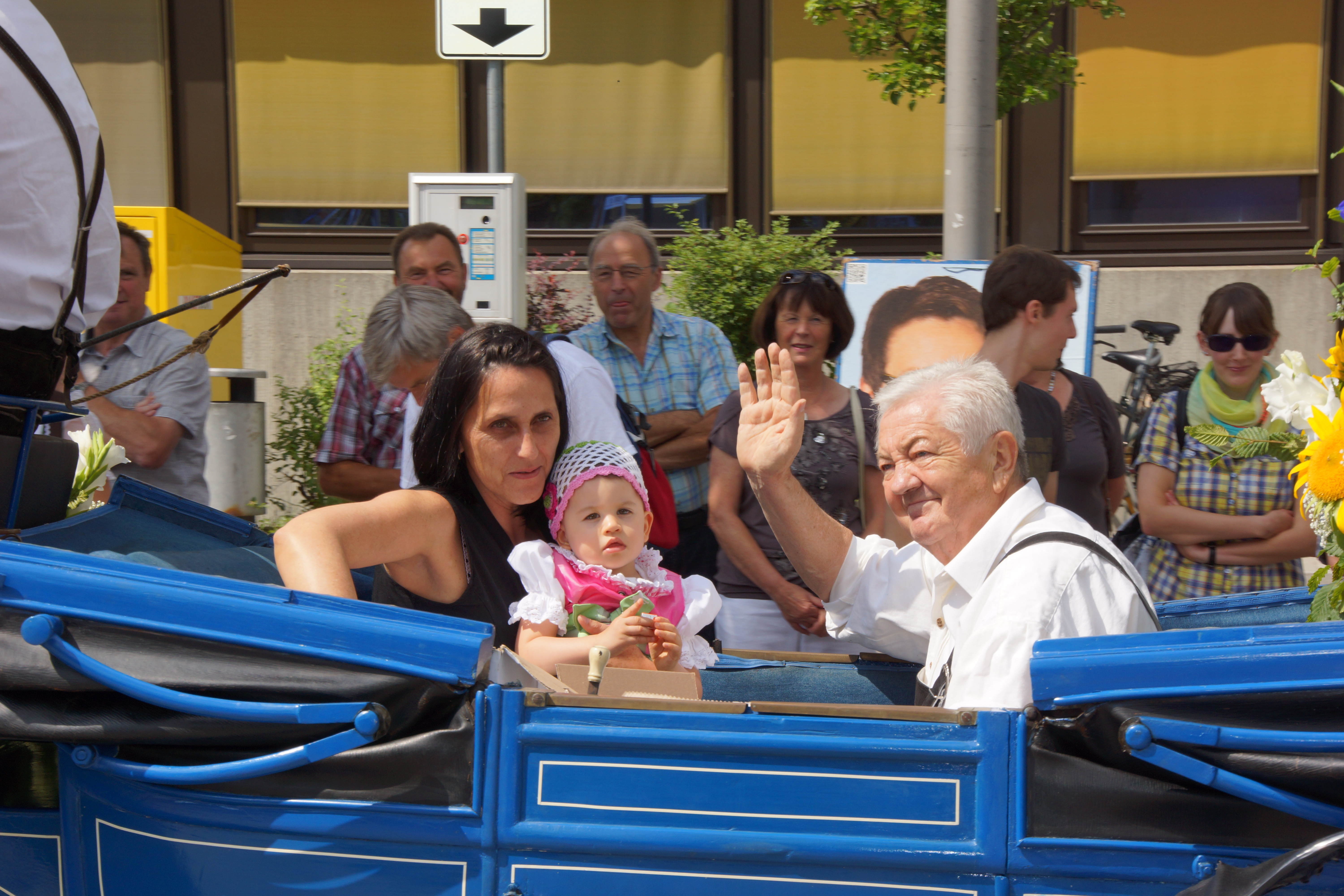 Der Volksfestumzug im Jahr 2013 in der Oberpfälzer Kreisstadt Neumarkt